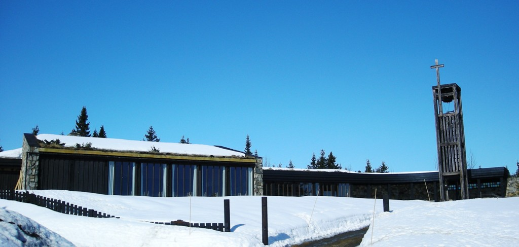 Sjusjøen fjellkirke (Ringsaker kommune)